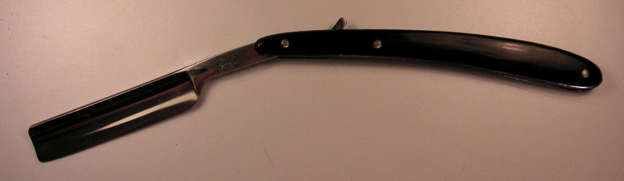 Rakkniv